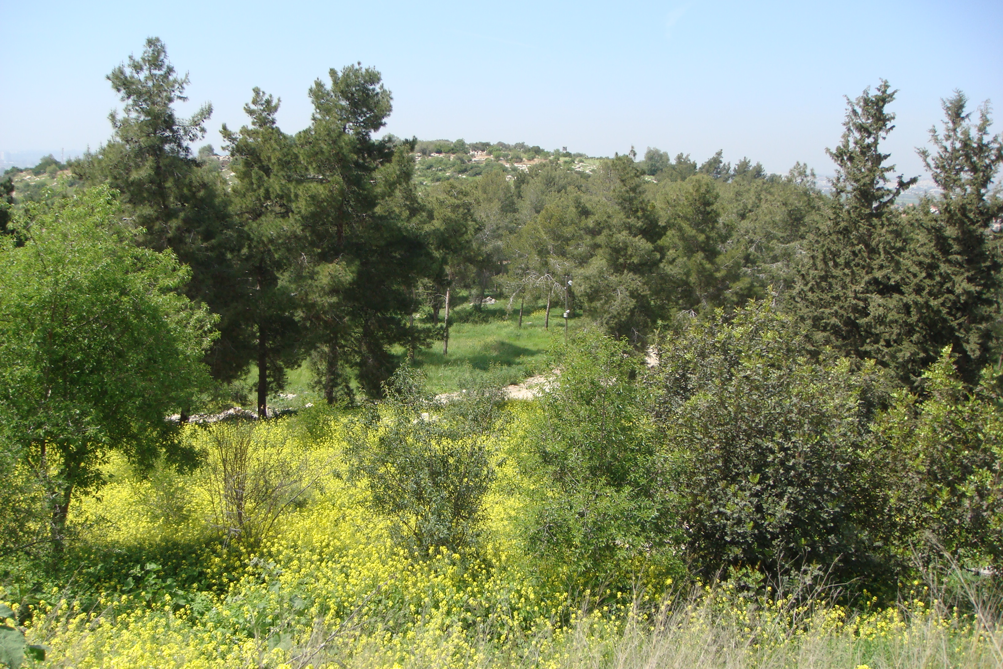 צילום של יער חורשים